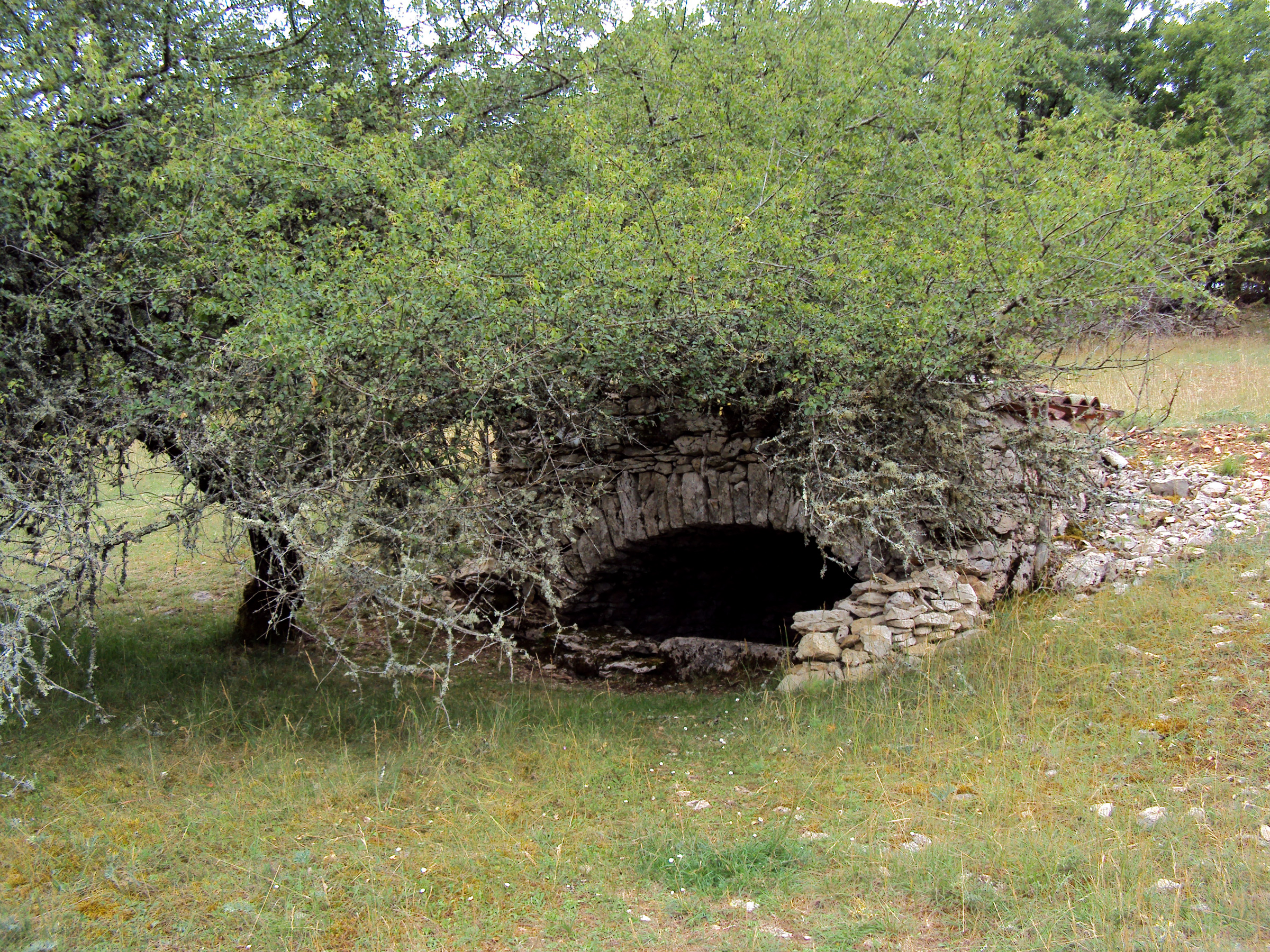 Sur le site de l'oppidum de Murcens - La Fontaine dite "de César" - Lot - France - 2011 Ænglisc: On the site of the oppidum of Murcens - The so called "fountain of Caesar" - Lot - France - 2011